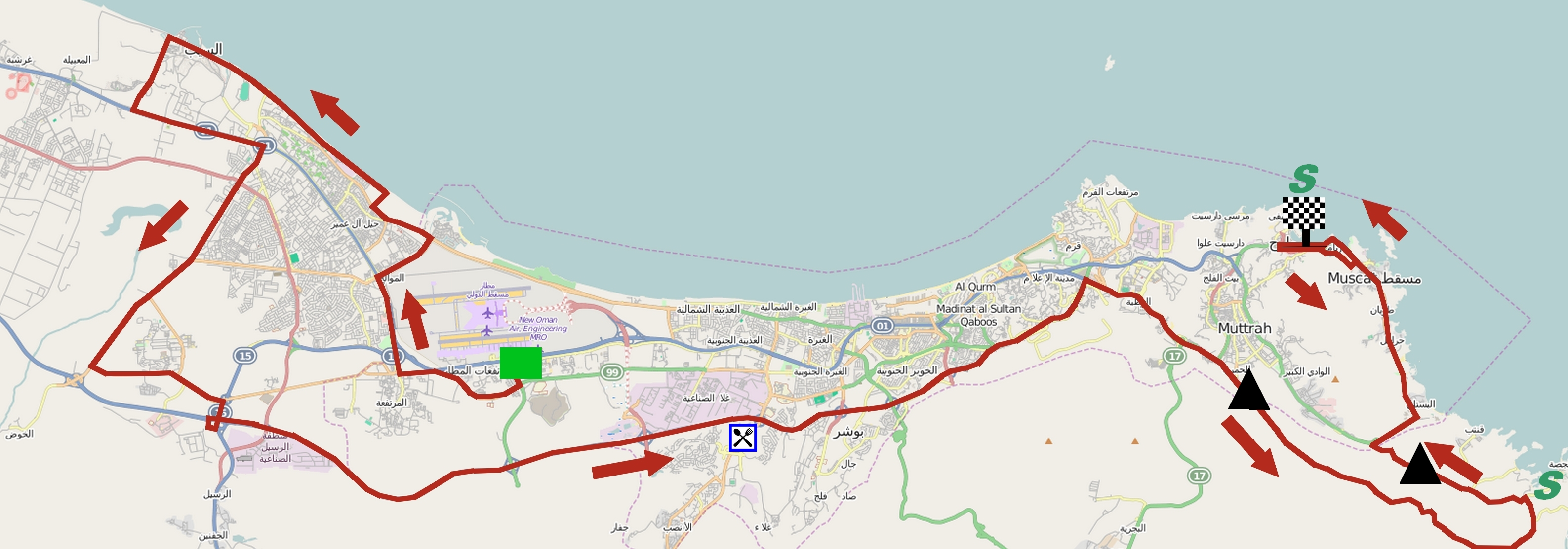 Parcours de la sixième étape du Tour d'Oman 2015. This map may be incomplete, and may contain errors. Don't rely solely on it for navigation.